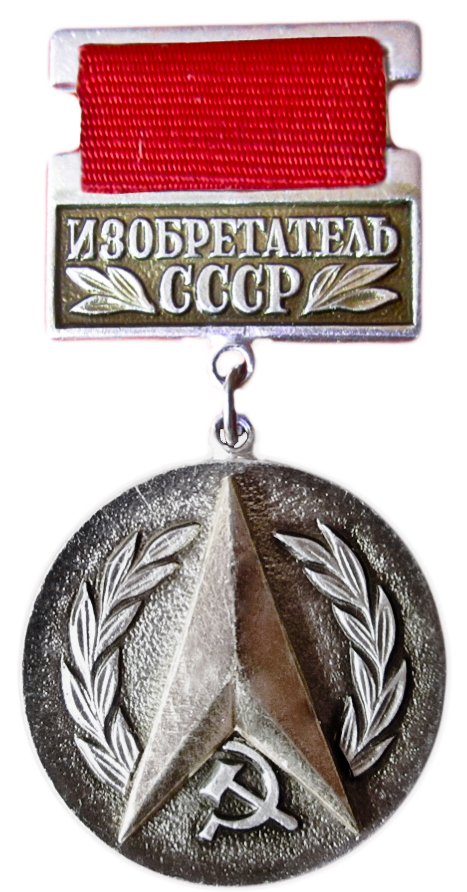 Нагрудный знак «Изобретатель СССР»